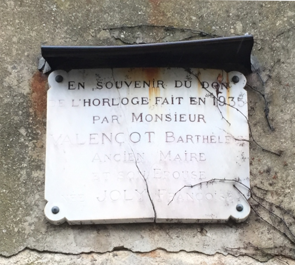 Plaque apposée sur l'église de Cordieux (Montluel) : En souvenir du don De l'horloge fait en 1935 Par Monsieur Valençot Barthélémy Ancien maire Et son épouse Née Joly Françoise